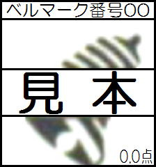 ベルマークの見本